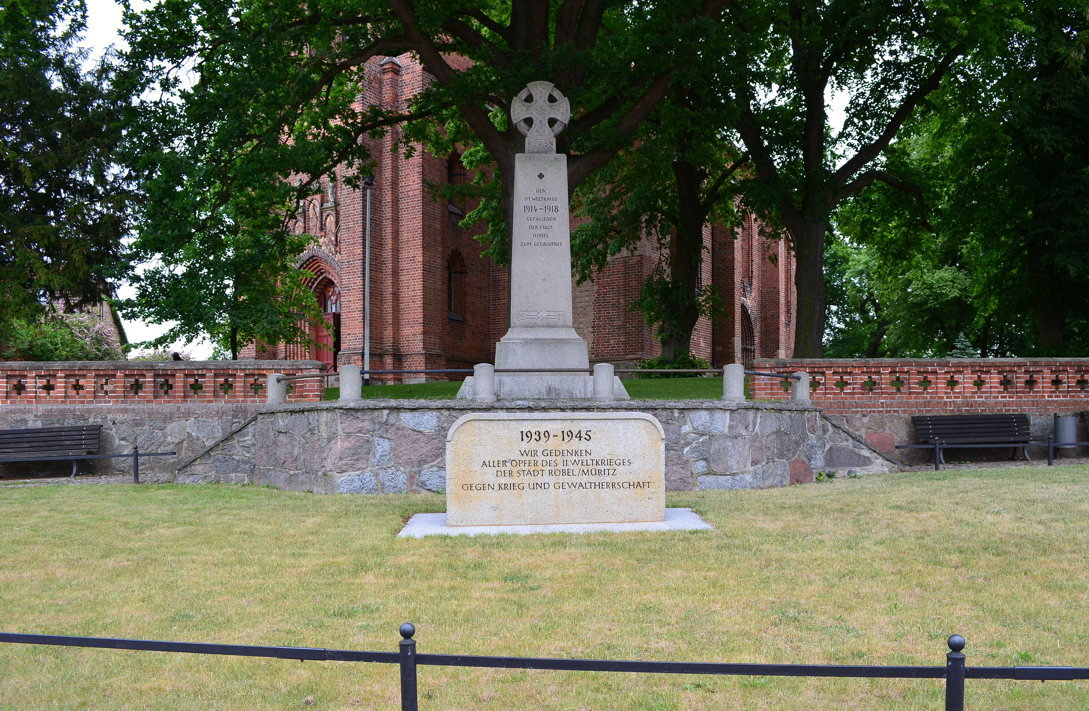 Röbel, Marienkirche, Kriegerdenkmal 2